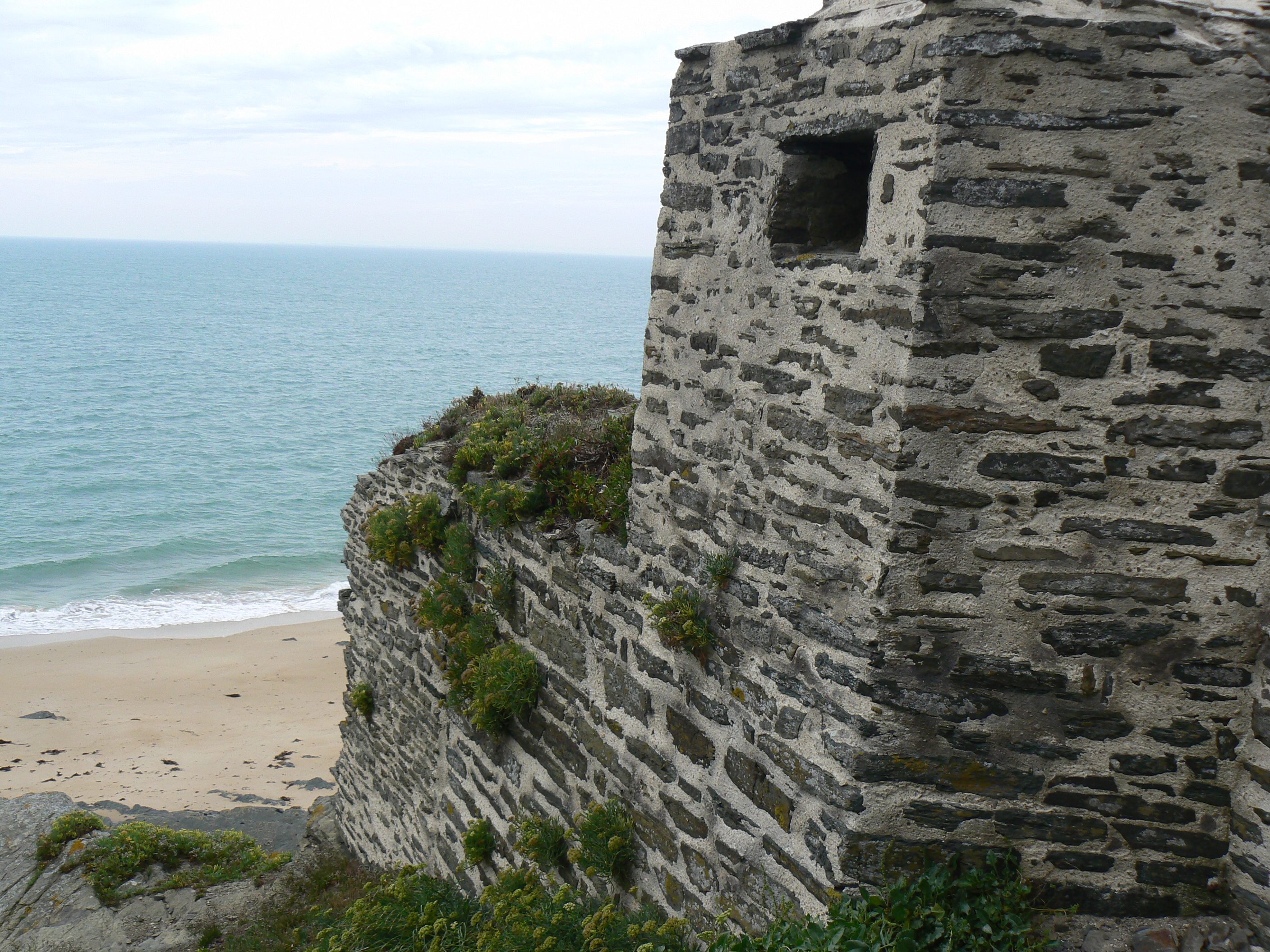 Vestiges de l'ancien corps de garde de Carteret